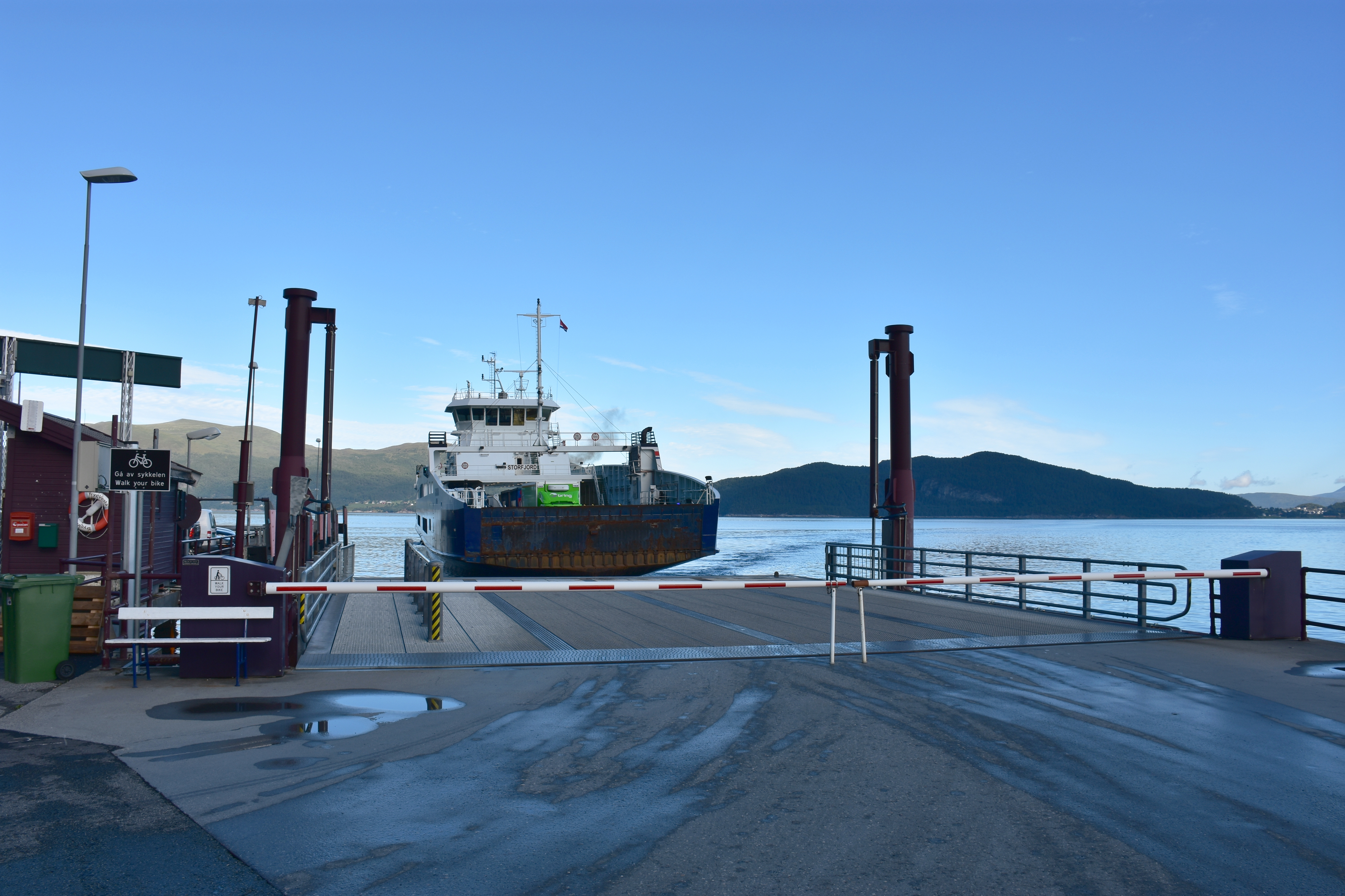 MF Storfjord ved Festøya